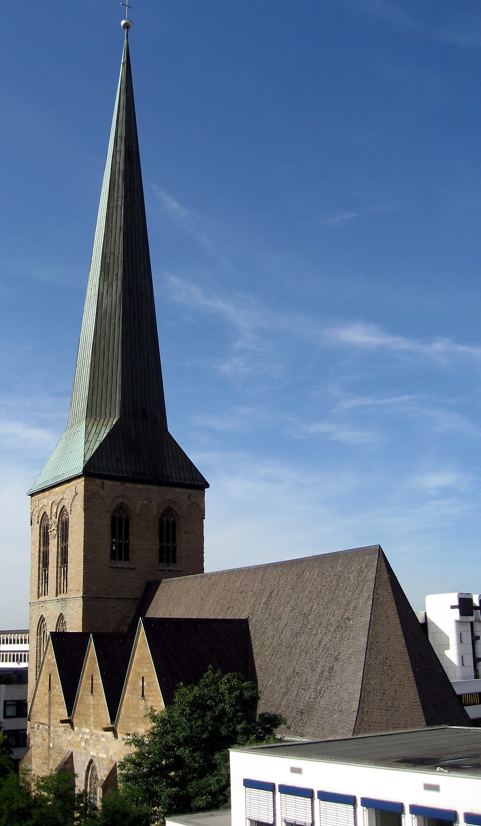 Petrikirche Dortmund Südseite